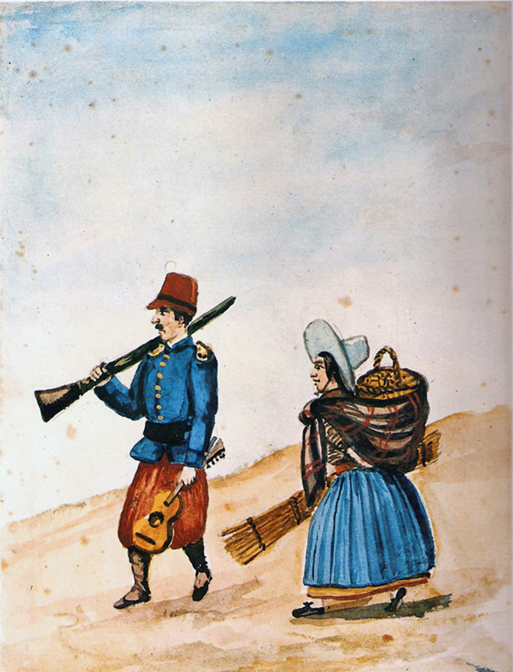 Acuarela de Pancho Fierro (Lima, 1807 - Lima, 1879)